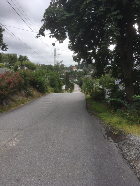 Florabakken Oslo august 2019